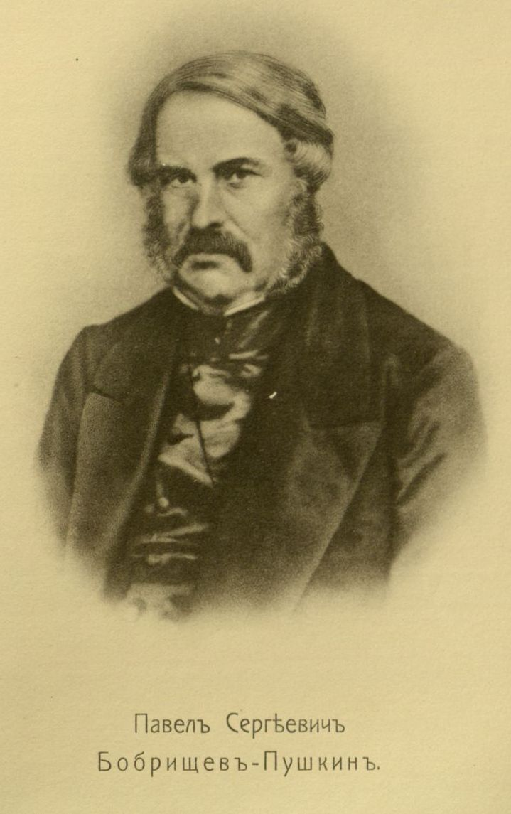 Головачев, П. М. Декабристы : 86 портретов, вид Петровского завода и 2 бытовых рисунка того времени. - М., [1906] Pavel Sergeevich Bobrischev-Pushkin